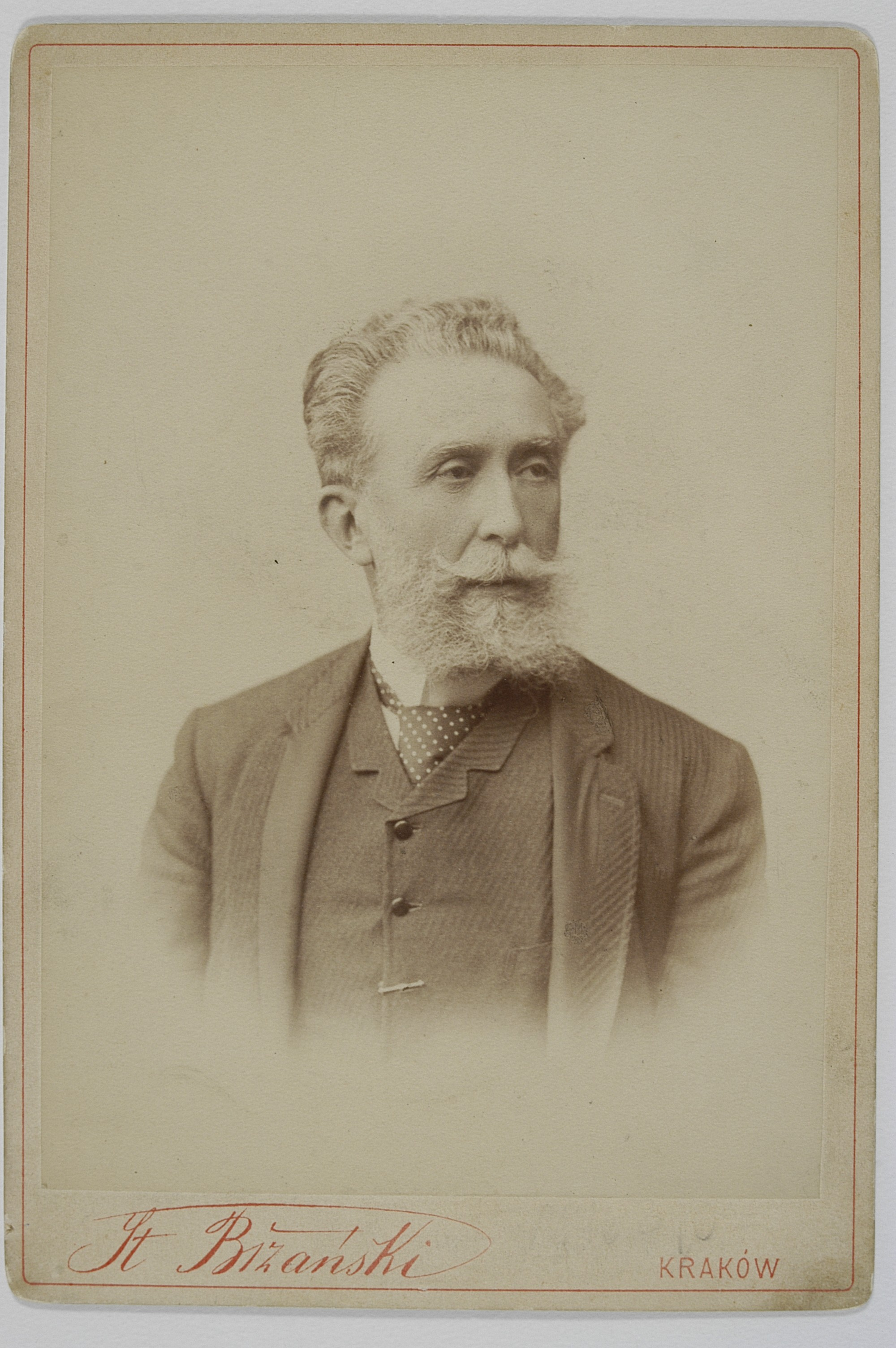 Stanisław Tarnowski, fot. przed 1890 r.